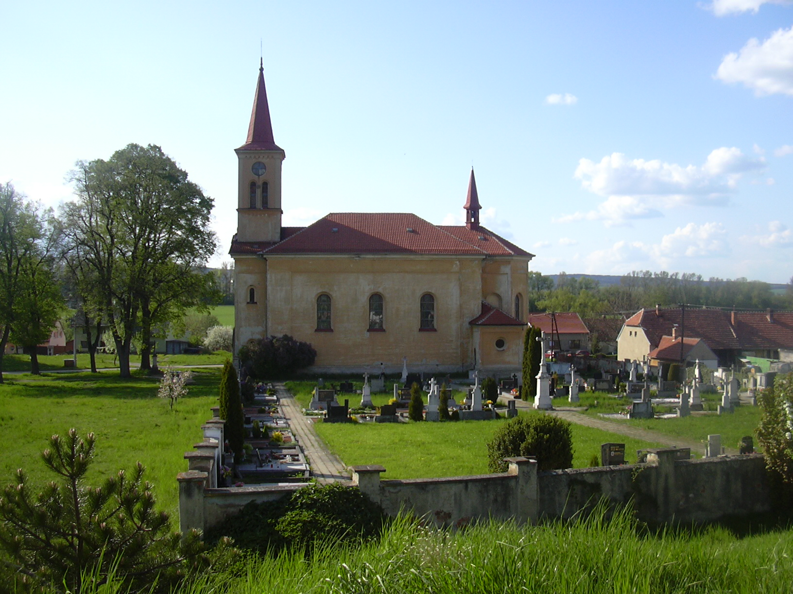 Kostel sv. Cyrila a Metoděje, Rostěnice-Zvonovice (Vyškov District - Czech Republic)